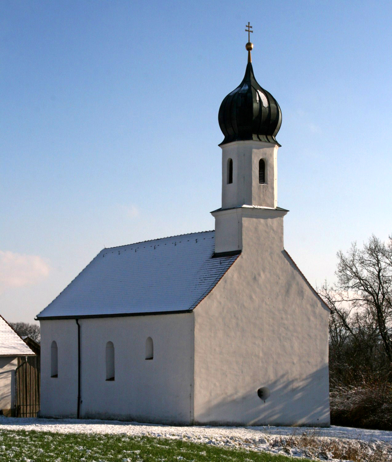 Die Filialkirche St. Martin in Loinbruck (Gemeinde Schwindegg, Landkreis Mühldorf am Inn, Oberbayern). Der ursprünglich romanische Bau wurde im 15. Jahrhundert gotisiert. Im 17. Jahrhundert folgte die Barockisierung, die weitgehend zum heutigen Erscheinungsbild führte.